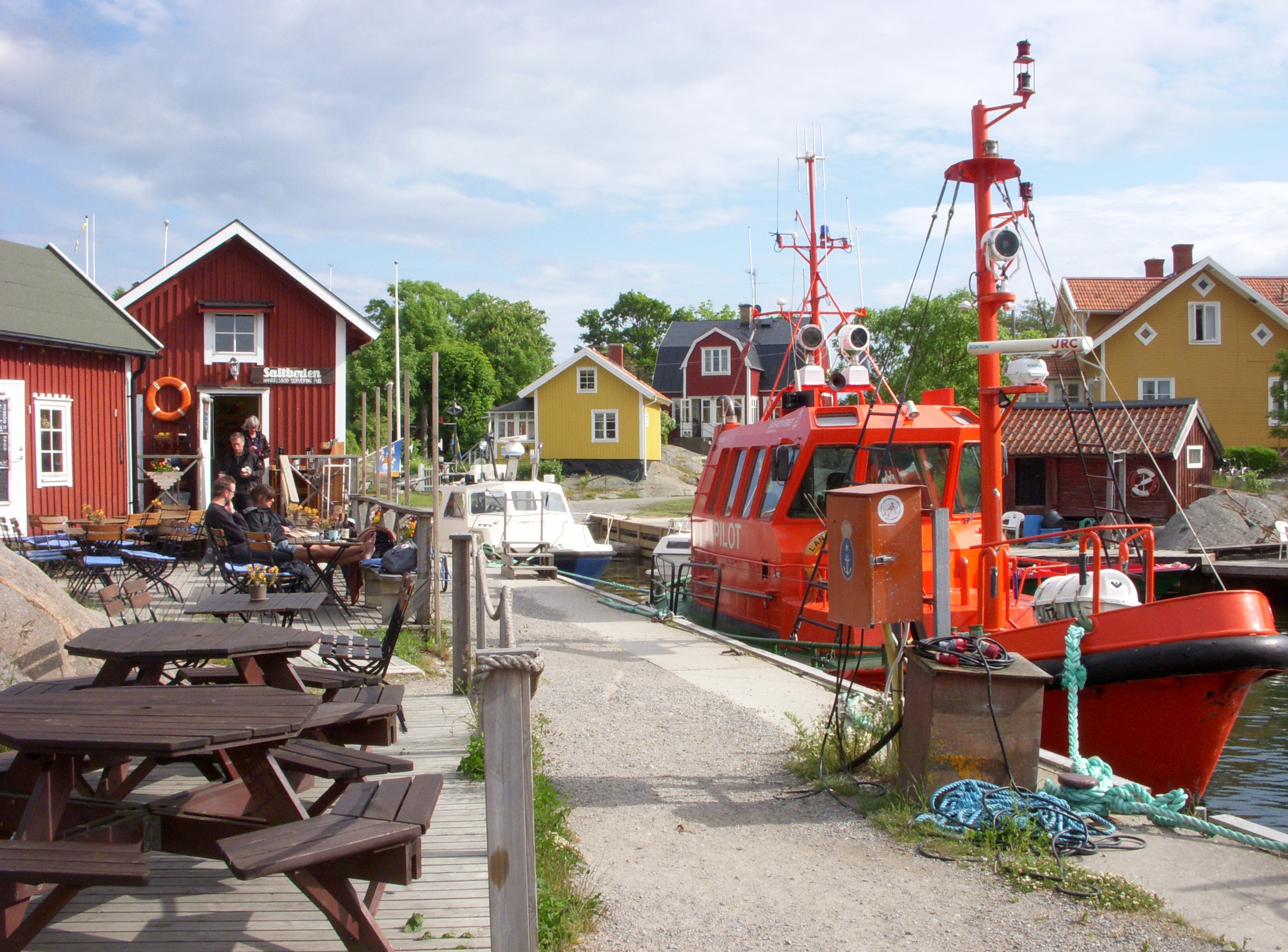 Lotsstation i Västra hamnen, Landsort